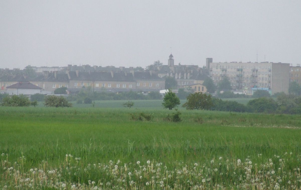 Panorama Wierzbicy k/Radomia